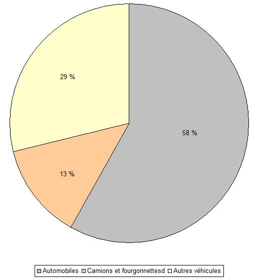 Répartition des véhicules à moteur dans la municipalité d'Utrera (Andalousie, Espagne), en 2007.